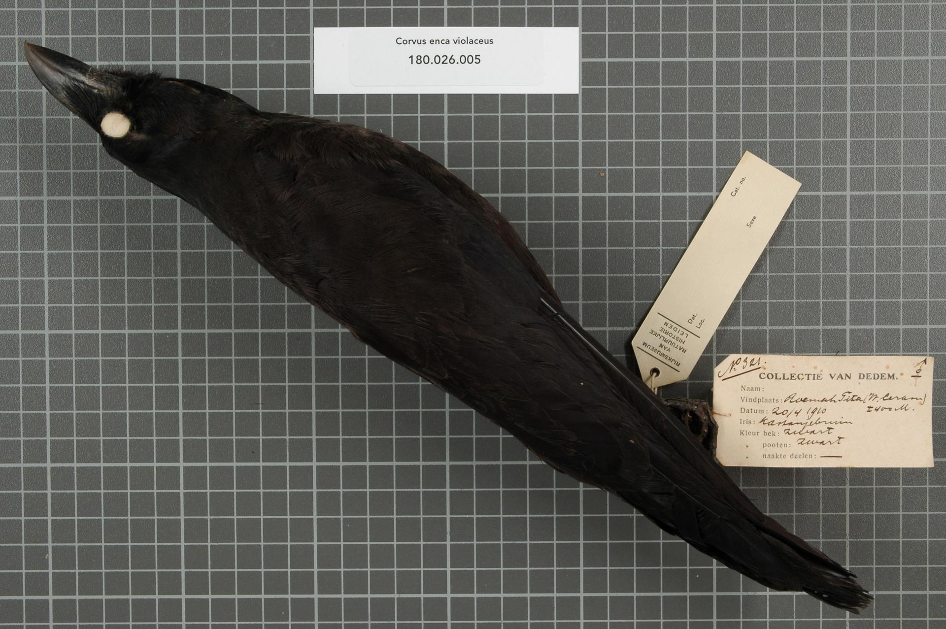 Corvus enca violaceus Bonaparte, 1851